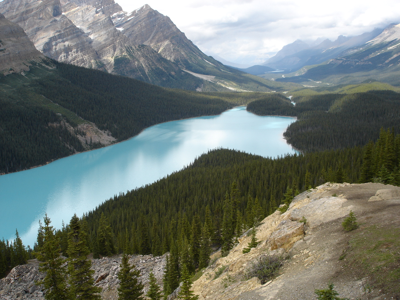 Vergleichsbild, steht nicht zur Wahl, weitere via Mayflower.